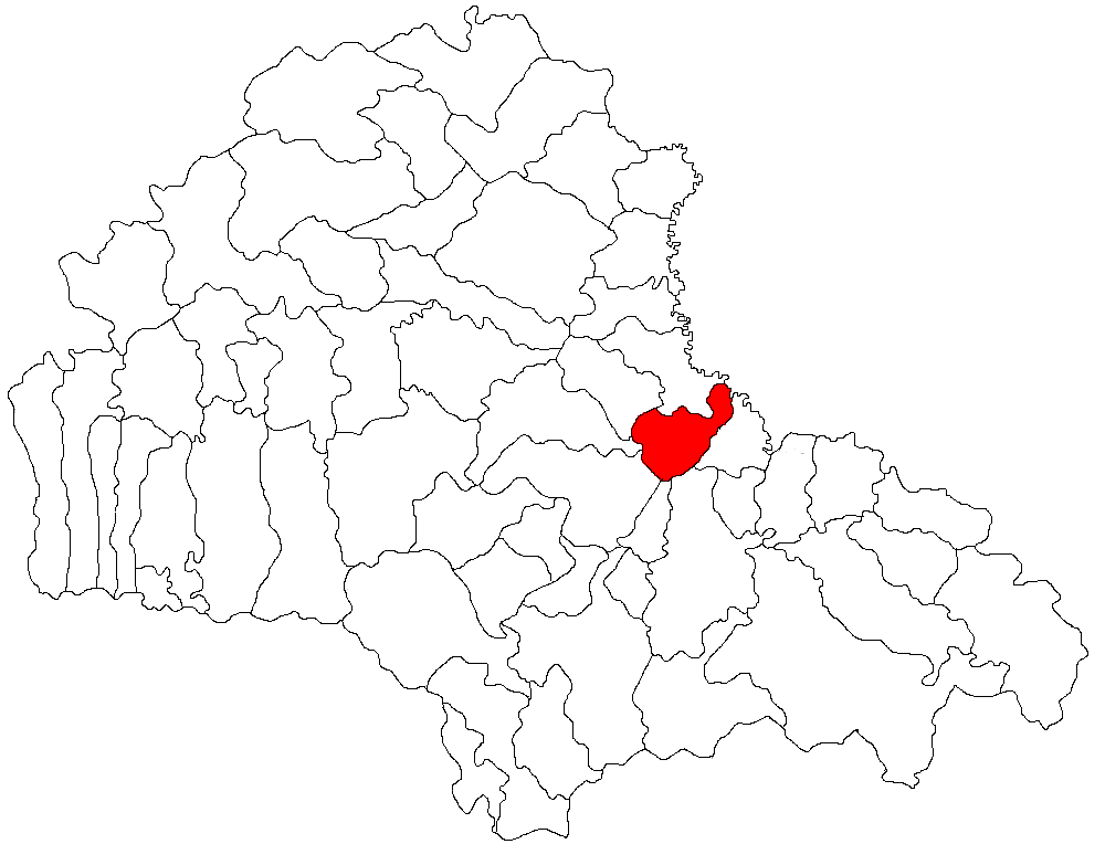 Categorie:Hărţi ale judeţului Braşov